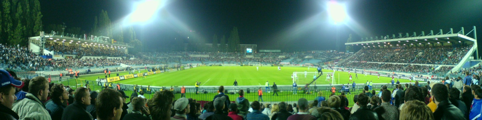 Na štadióne